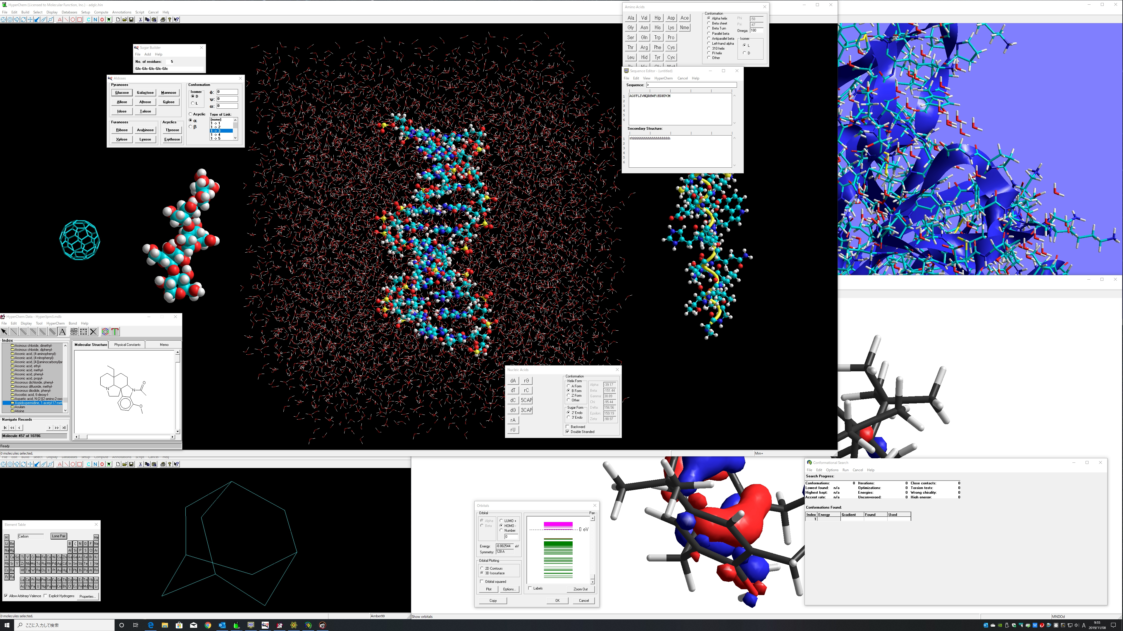 統合分子モデリング・分子シミュレーションソフトのHyperChemは同時に複数スレッドを立ち上げることが可能なため、コア（スレッド）数分の独立したHyperChemで同時に別々の分子モデリング・分子シミュレーション作業ができます。また、ワークスペース内の個々の分子を個別に計算対象とでき、レンダリングなどもそれぞれの分子や部分構造に自由に適用できます。